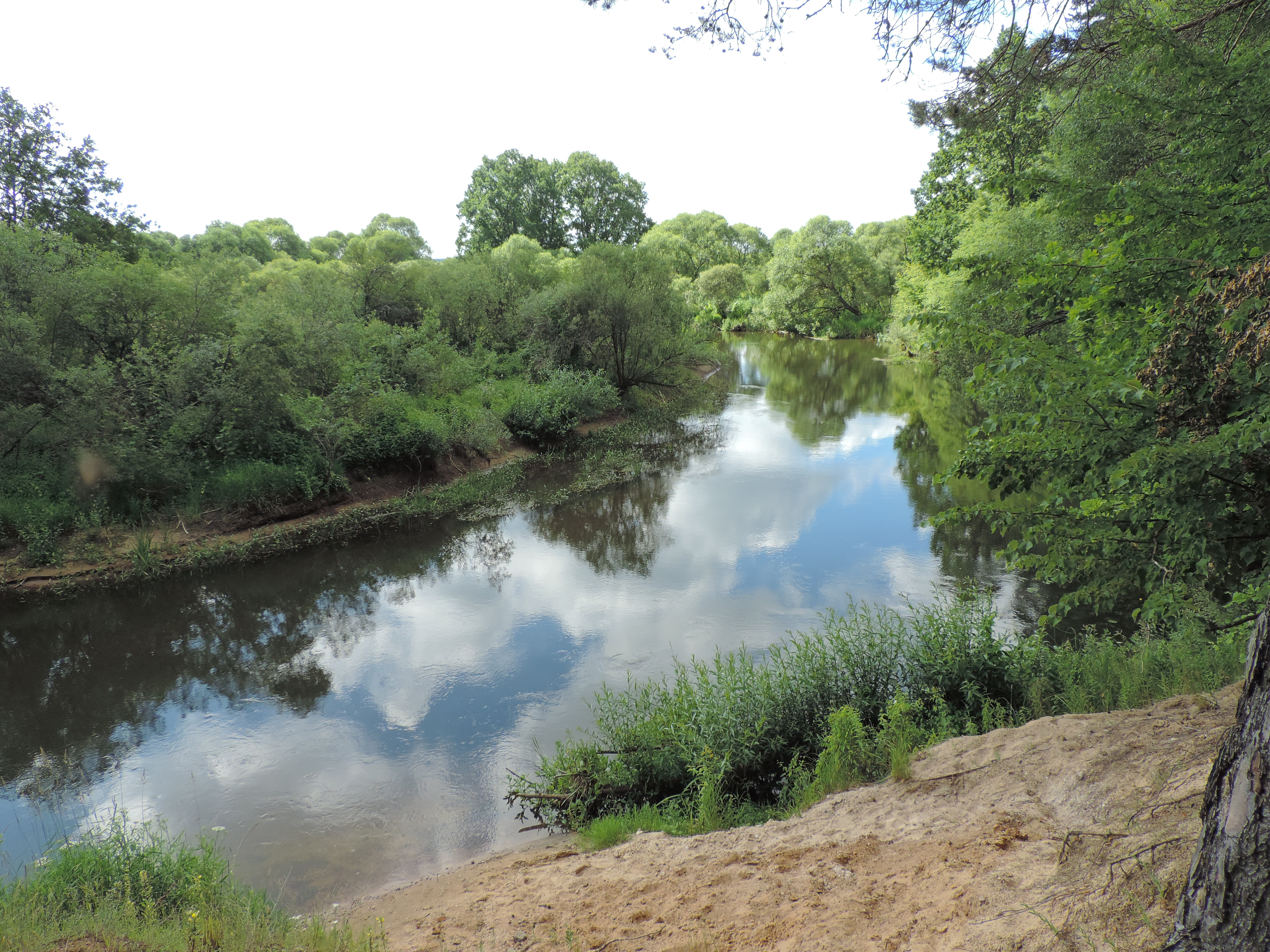 поход)